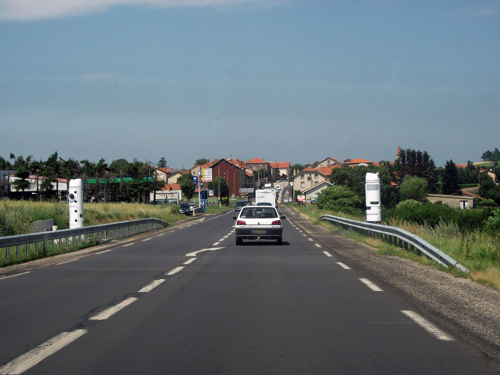 Route nationale 88 avant l'entrée dans Costaros (Haute-Loire, Auvergne, France)